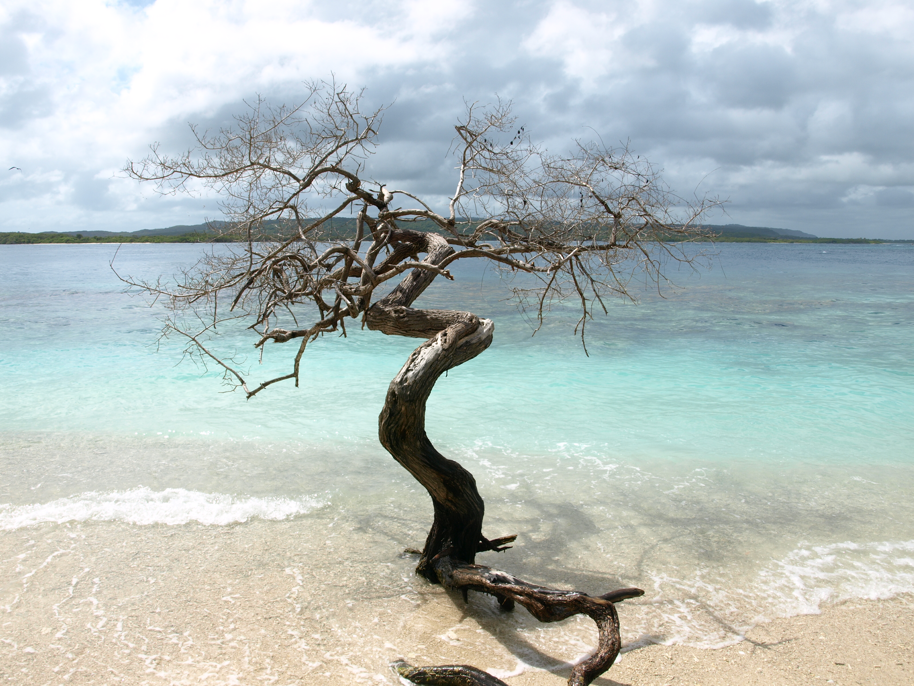 ÁRBOL DEL CONOCIMIENTO MARINO